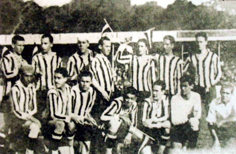 Winner of the Championship of Rio Grande do Sul / Vencedor do Campeonato Gaúcho 1931 Grêmio FBPA of Porto Alegre (RS). Em pé/standing: Laci, Esperança, Luiz Carvalho, Sardinha II, Artigas, Poroto, Foguinho. Front/joelhados: Adão, Dario, Russo, Adroaldo, Sardinha I, Lara, Armênio.